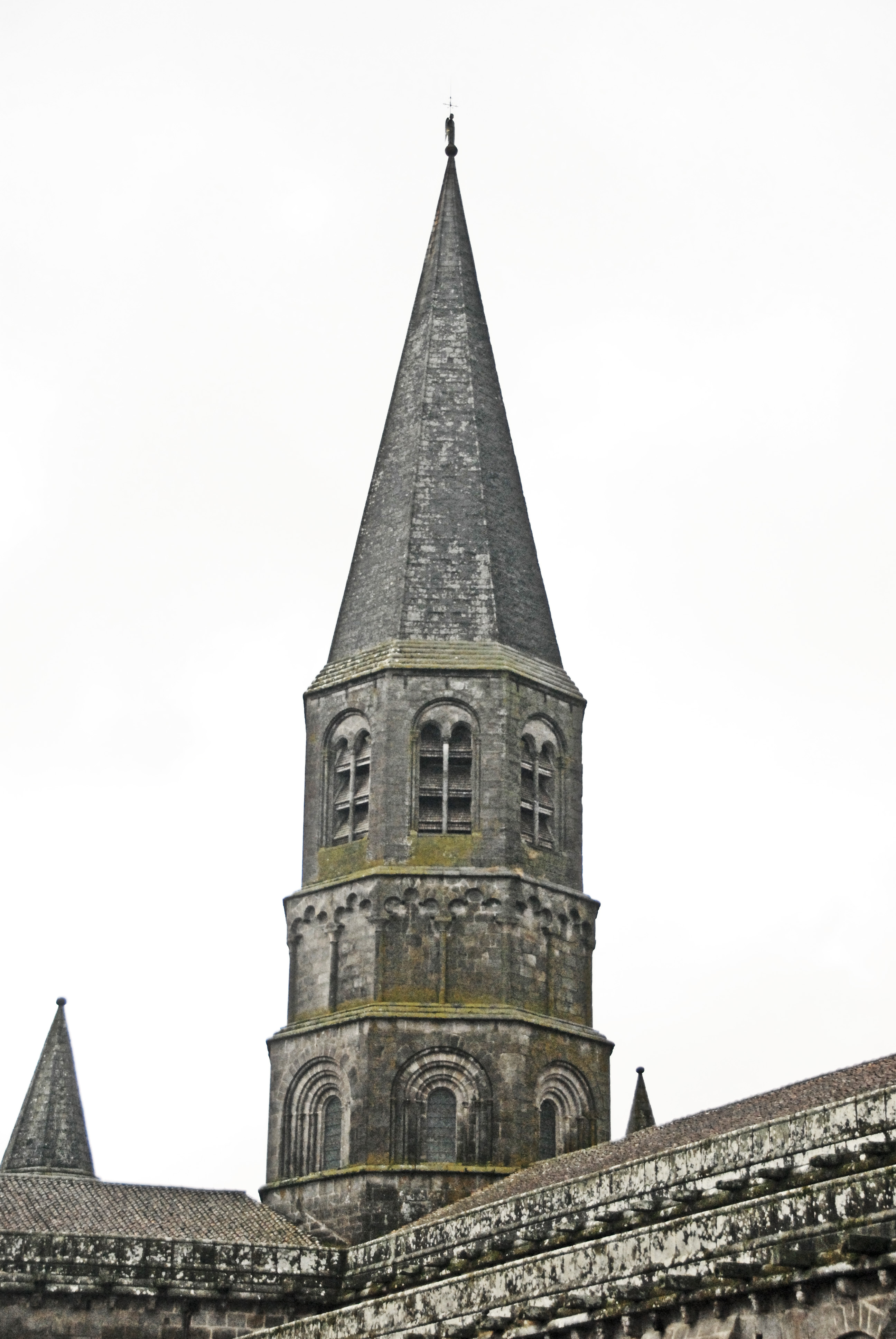 St-Pierre de Le Dorat, Glockenturm von NW